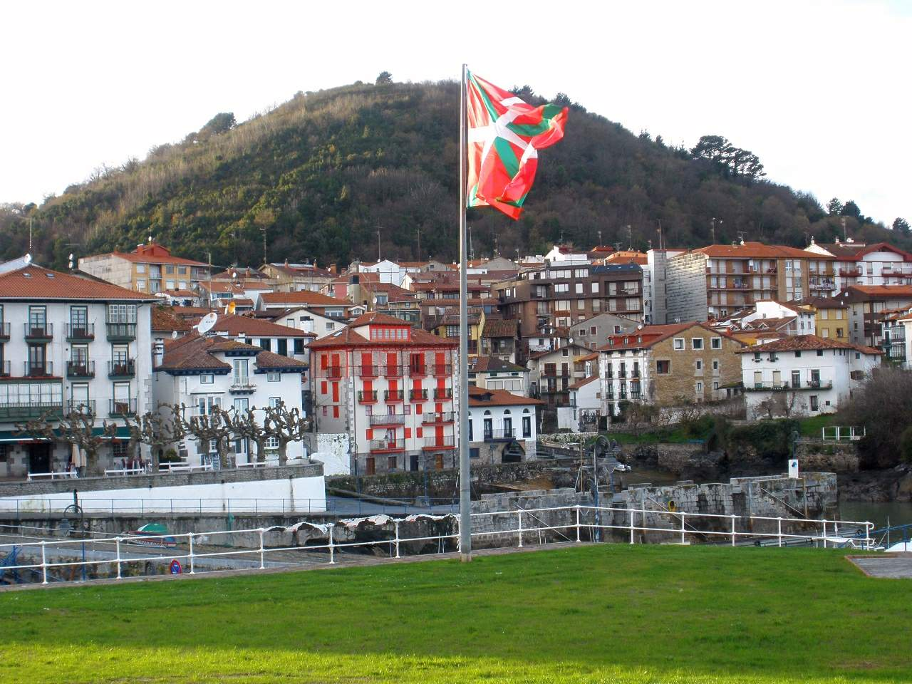 Mundaka (Bizkaia)